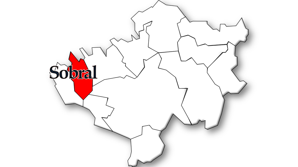 População